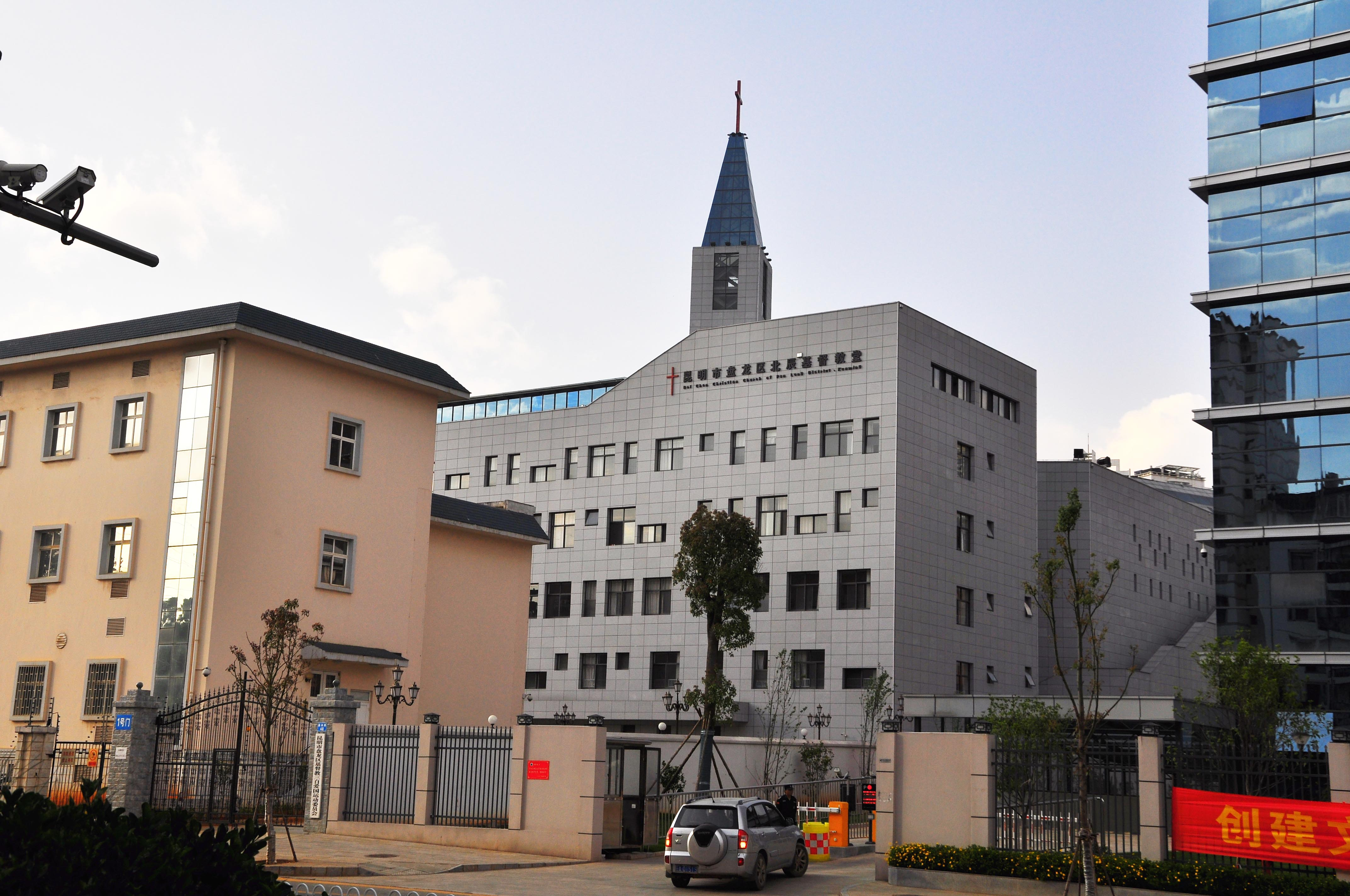 昆明市盘龙区北辰基督教堂。